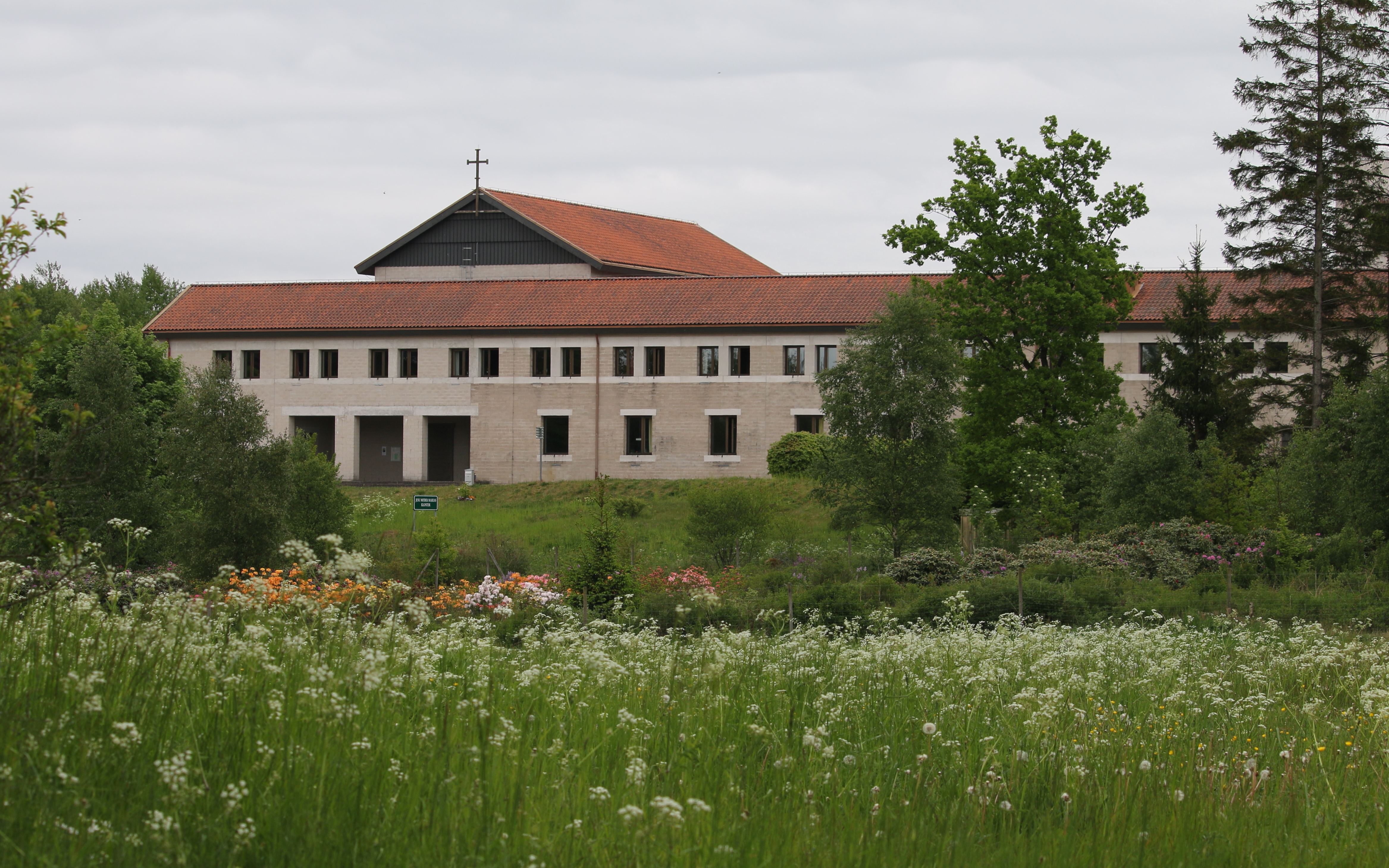 Mariavalls kloster 2016